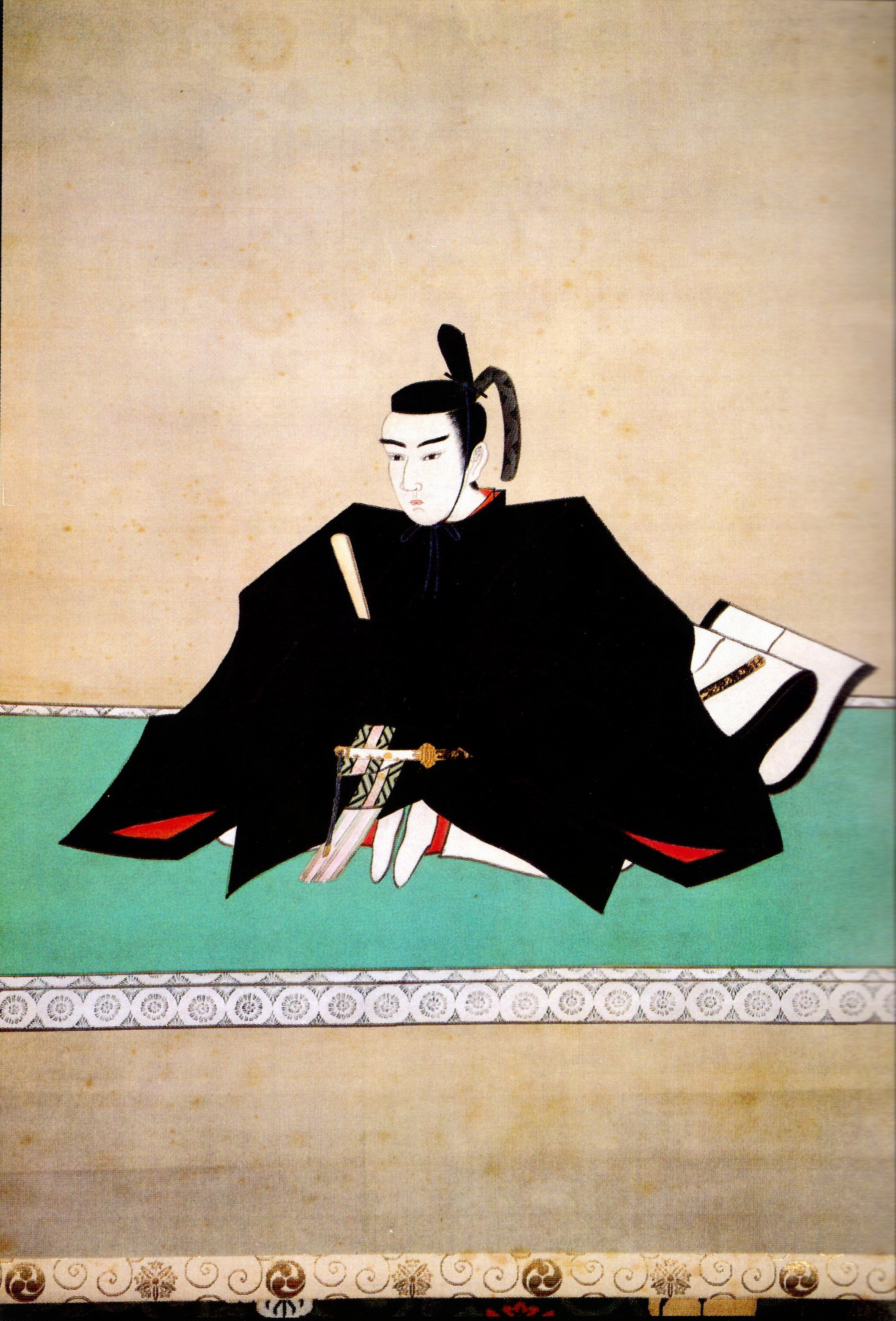 有馬頼永の肖像。